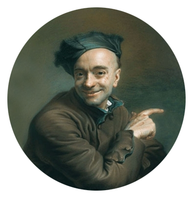 La bonne humeur de Quentin de la Tour (par lui-même)